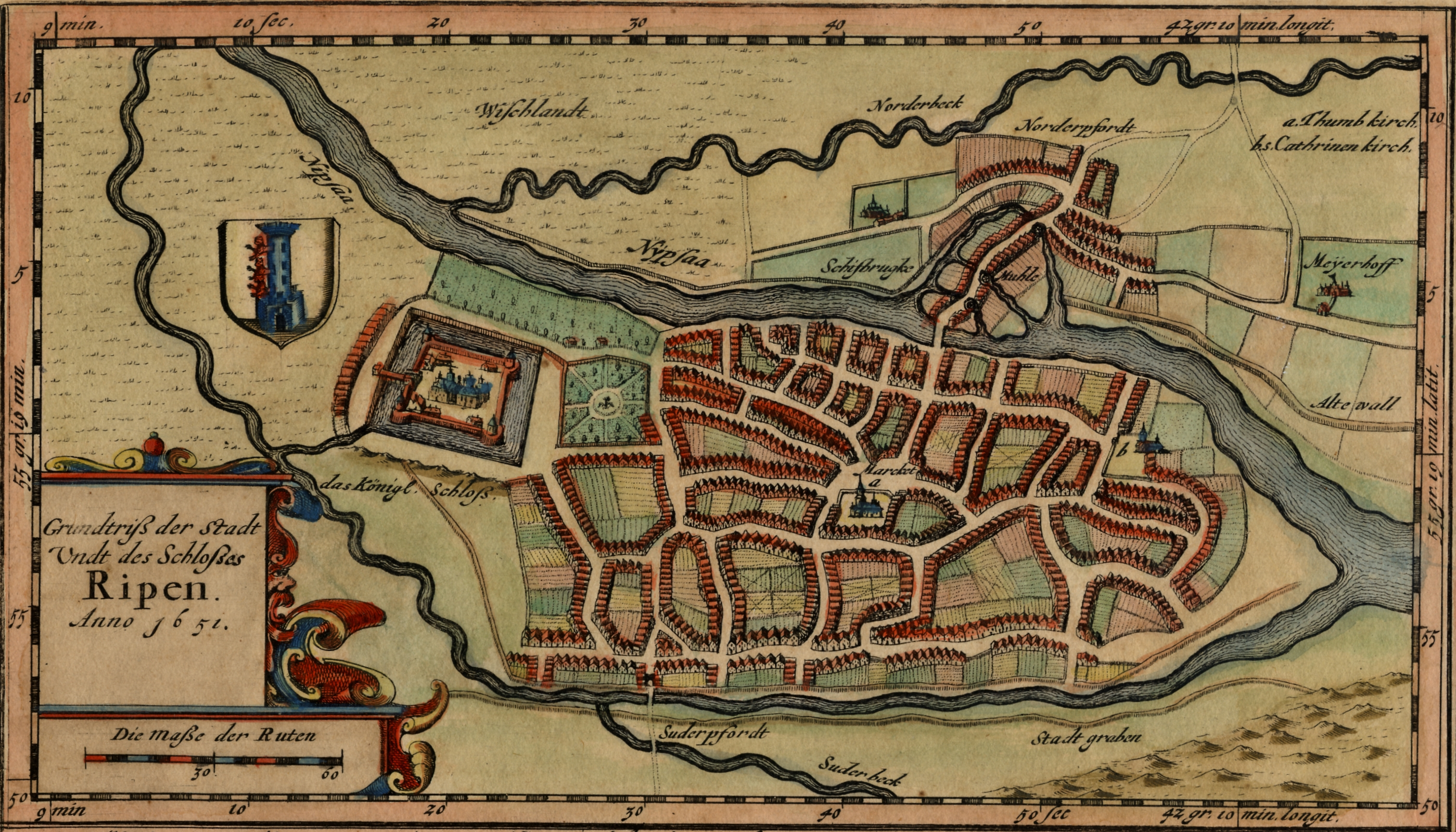 Karte von Ripen, Druck, handkoloriert